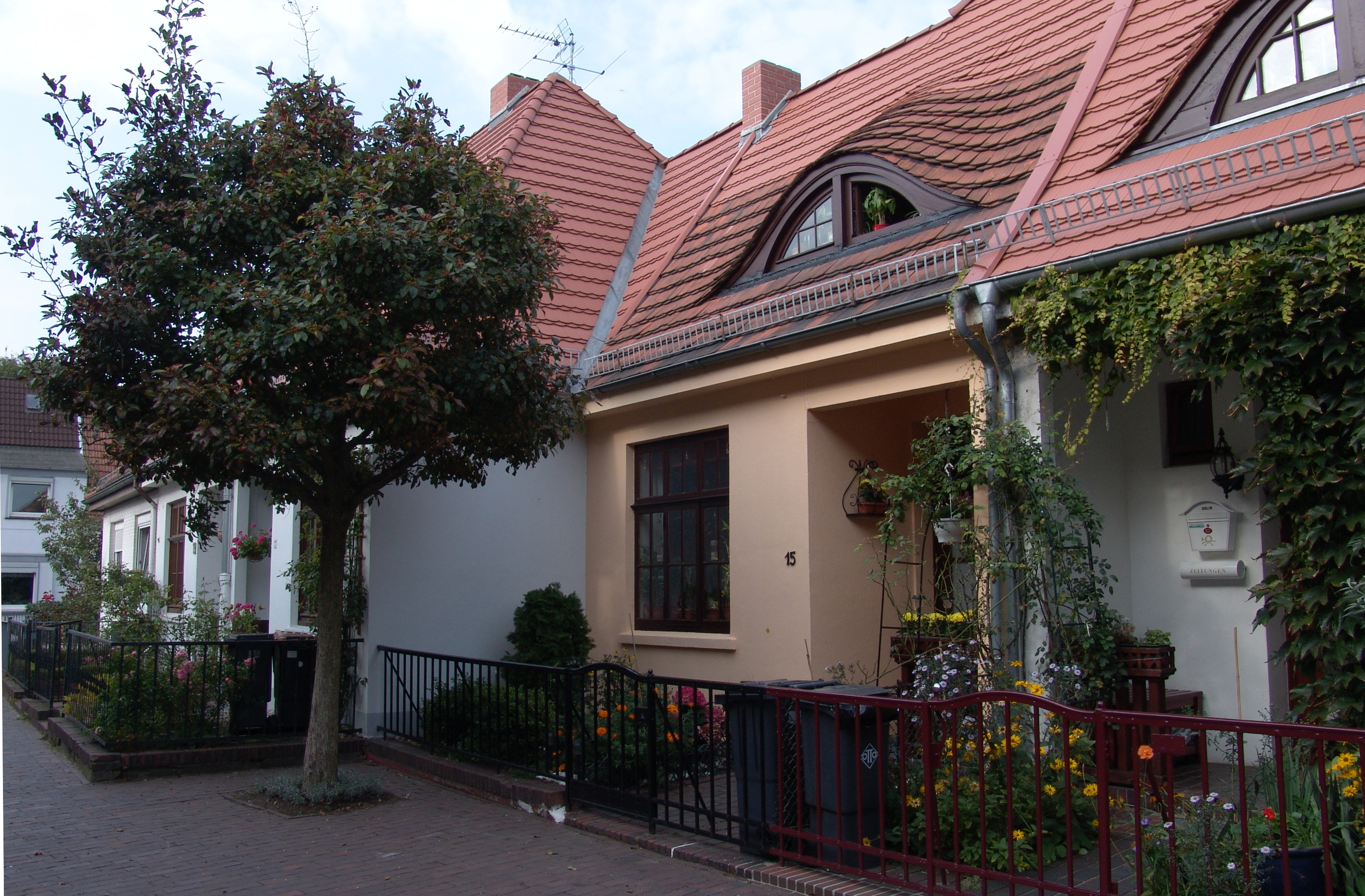 Wohnhaus in Bremen, Feierabendweg 15.Das abgebildete Objekt ist ein geschütztes Kulturdenkmal in der Freien Hansestadt Bremen, mit der Nr. 0376 beim Landesamt für Denkmalpflege registriert.